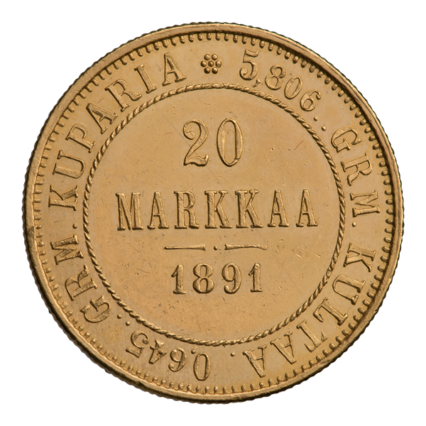 Двадцать марок 1891 г. (реверс). Биткин 227 (R). Внутри верёвочного ободка обозначение номинала: 20 MARKKAA; под фигурной чертой дата: 1891. Круговая надпись: 5,806 .. GRM. KULTAA. 0,645 .. GRM. KUPARIA *